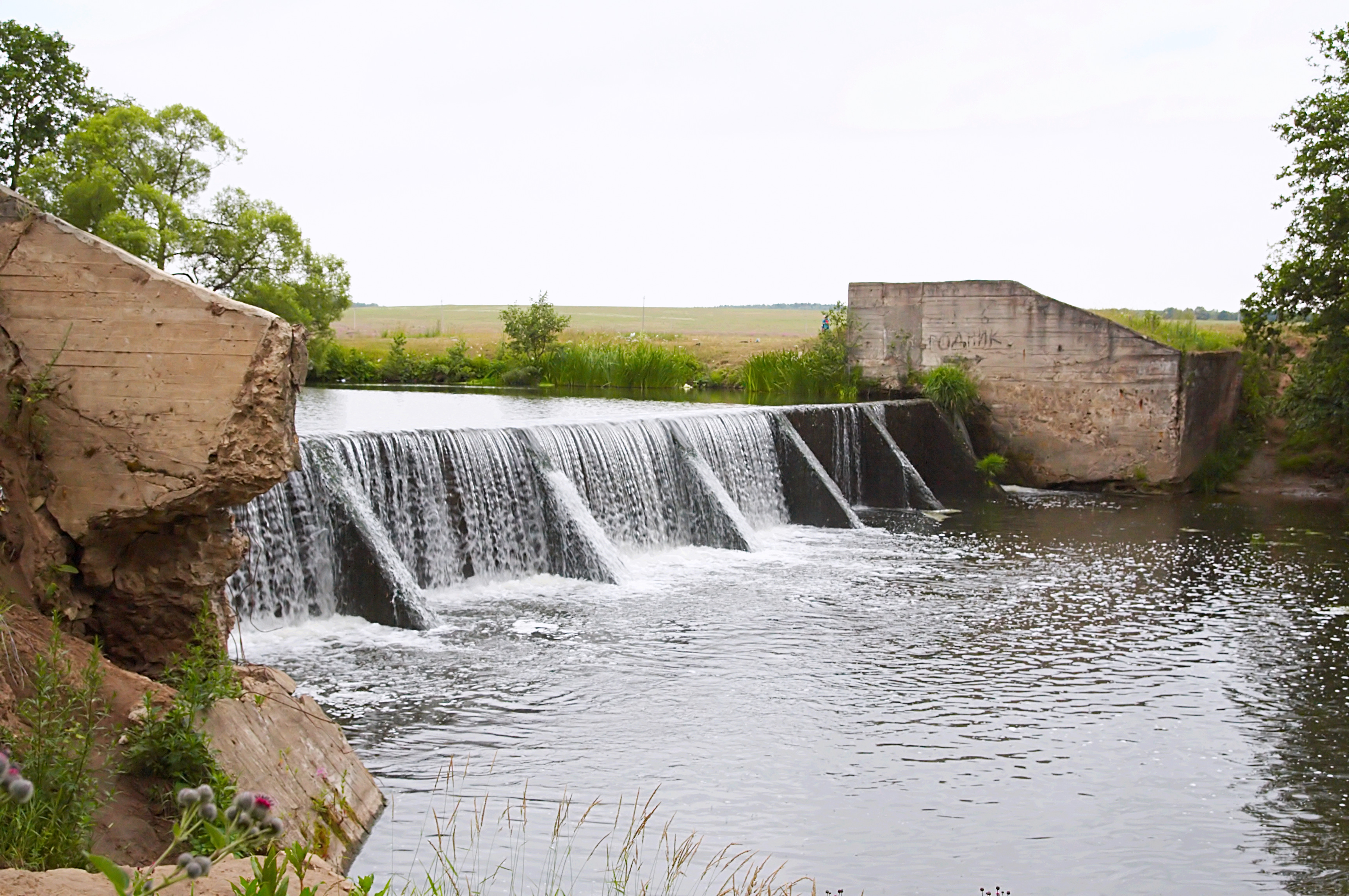 Плотина на реке Рожайка. Московская область